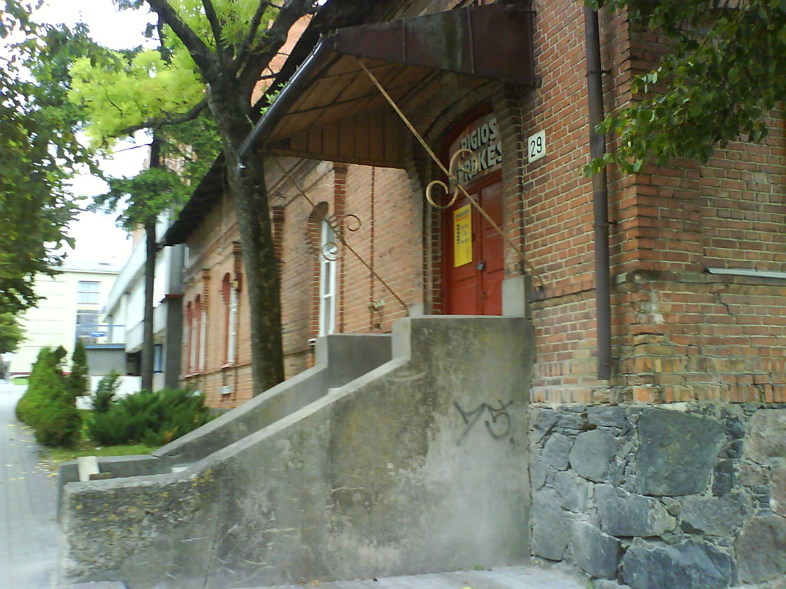 Kupiškio senasis paštas